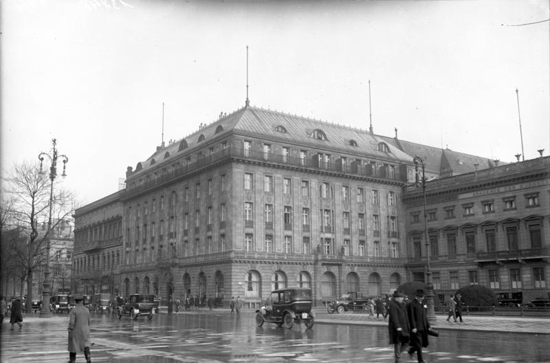 Luis Adlon, der Besitzer des berühmten Hotels "Adlon" in Berlin, hat jetzt die Leitung seines Unternehmens selbst übernommen !